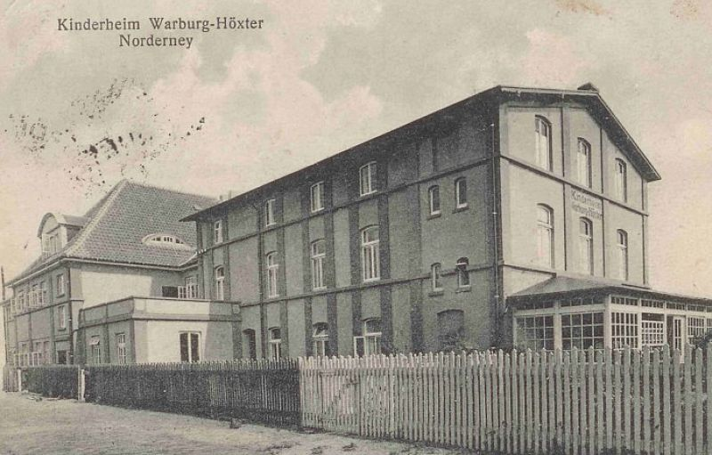 Kinderheim Warburg Norderney ca 1922